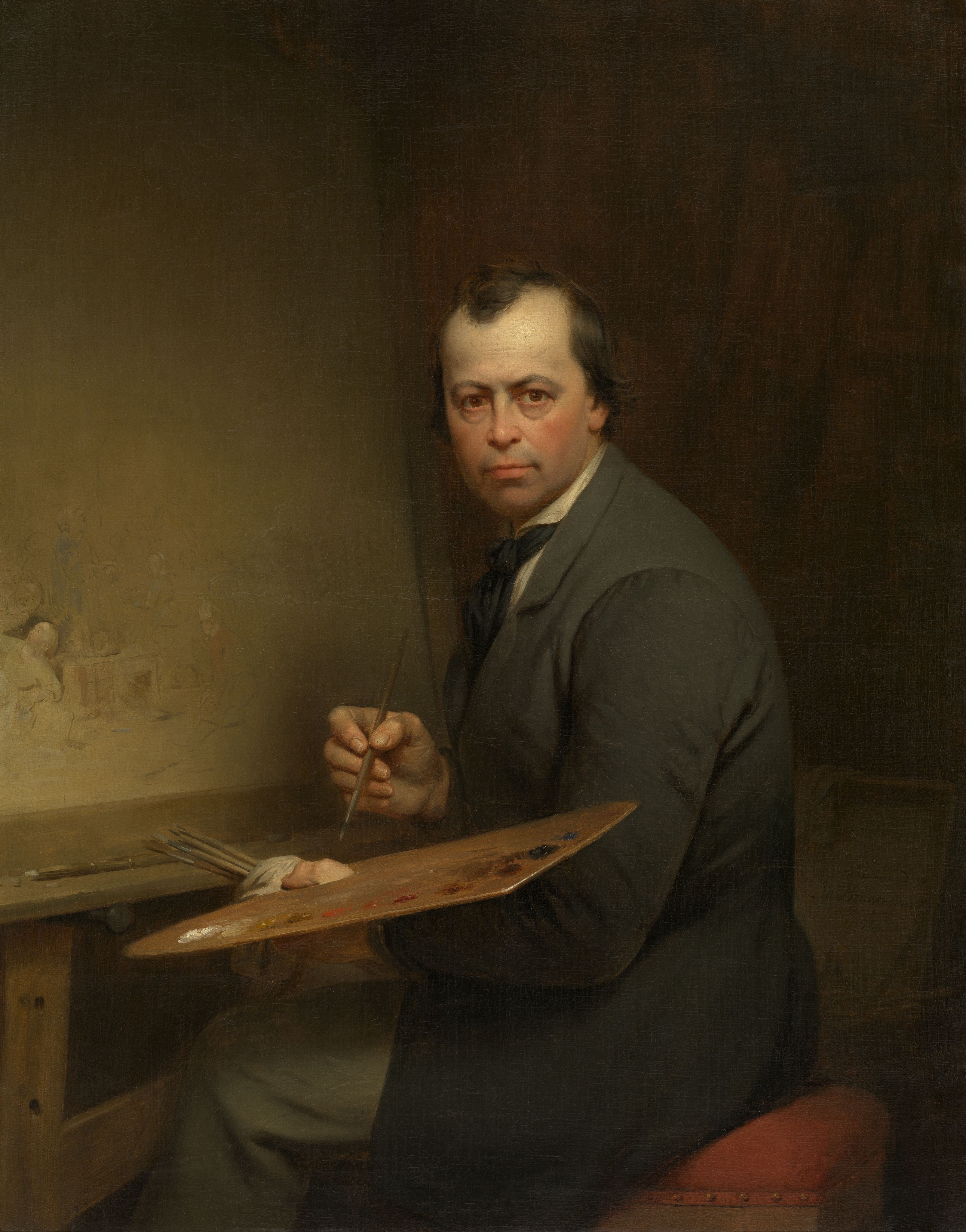 Self-portrait Ferdinand De Braekeleer